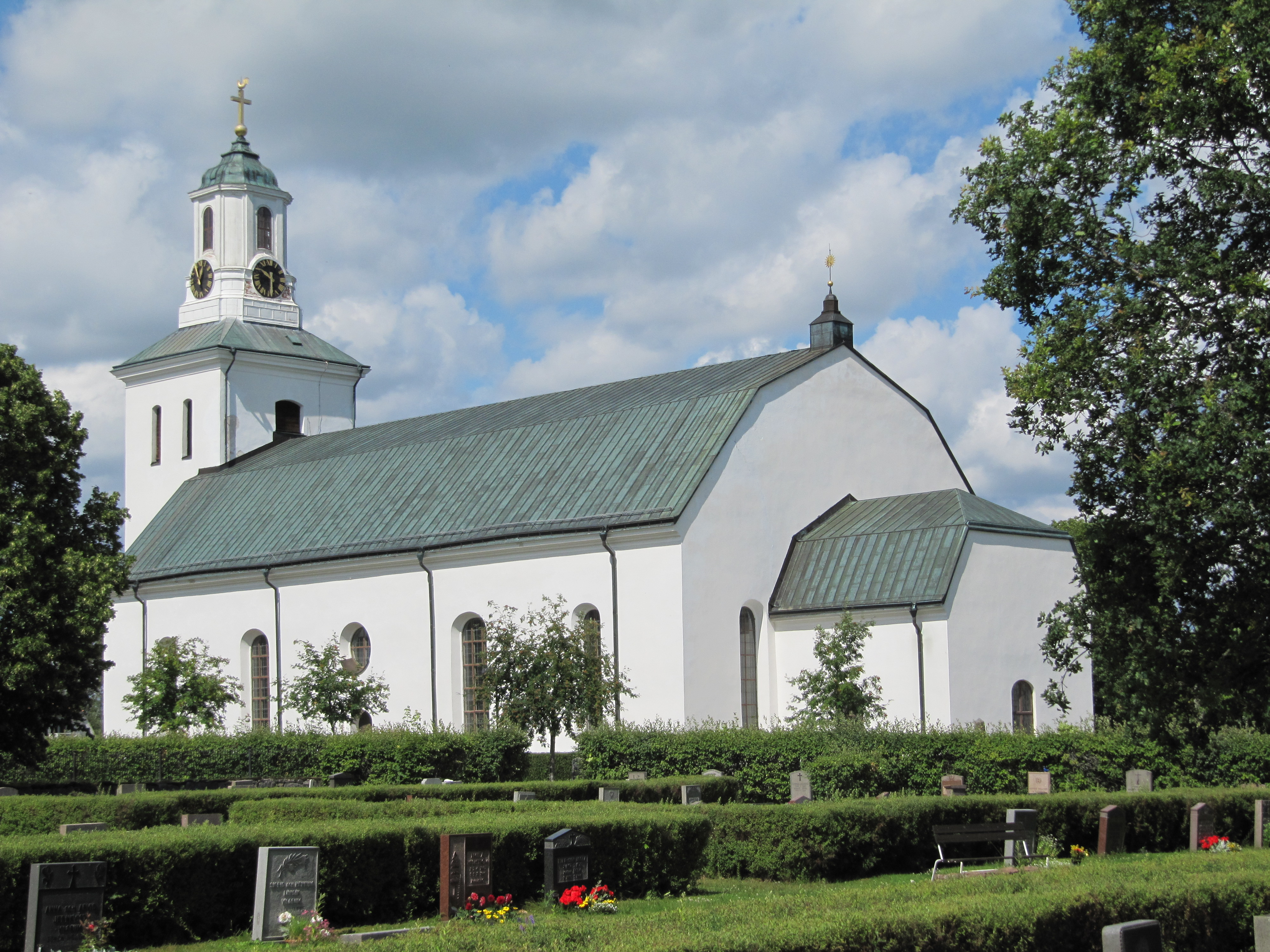 Hedesunda kyrka